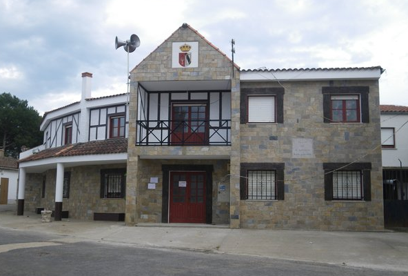 Fachada Ayuntamiento Cereceda de la Sierra (Salamanca)